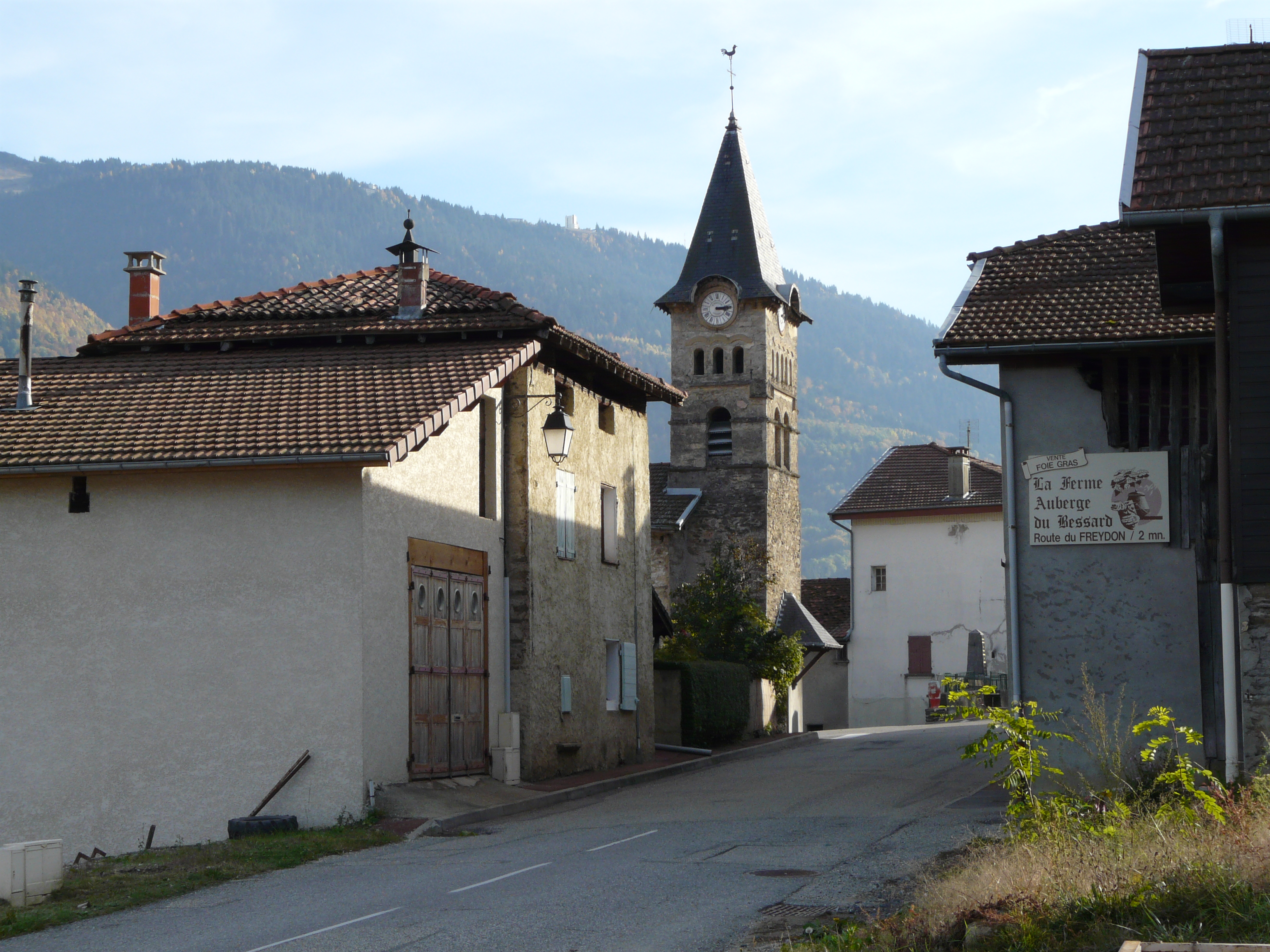 Le Moutaret en octobre 2009